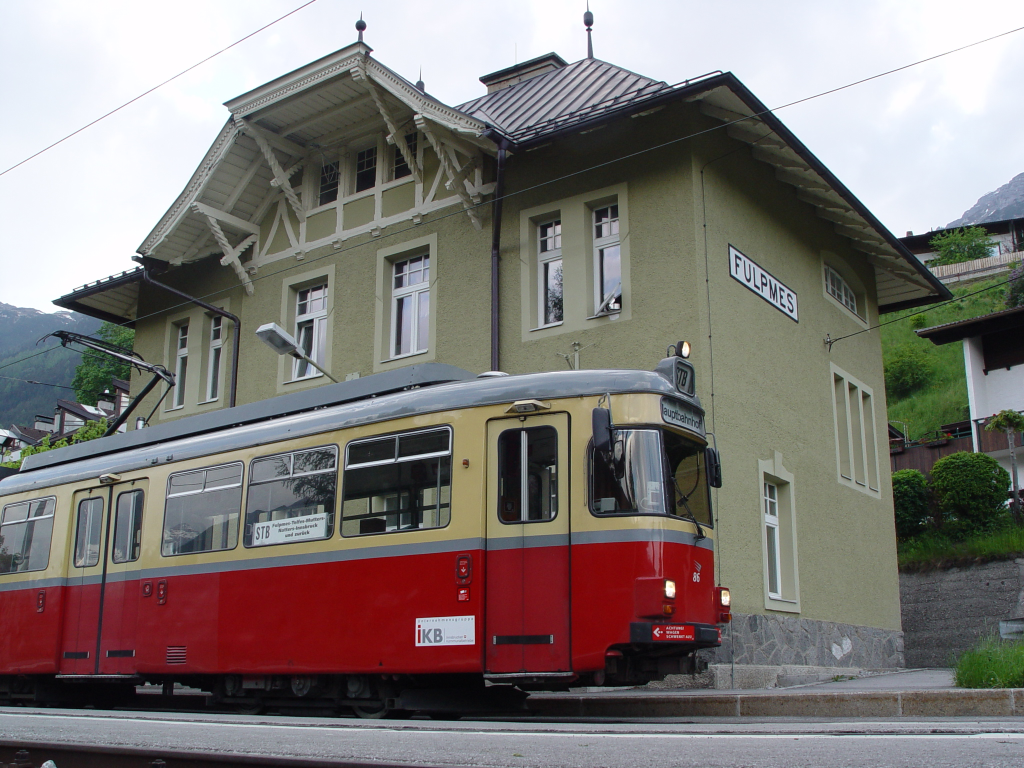 TW86 im Bahnhof Fulpmes